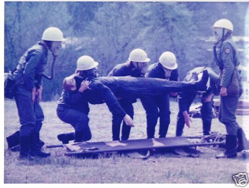 Zivilverteidigung DDR Bergung von Verletzen